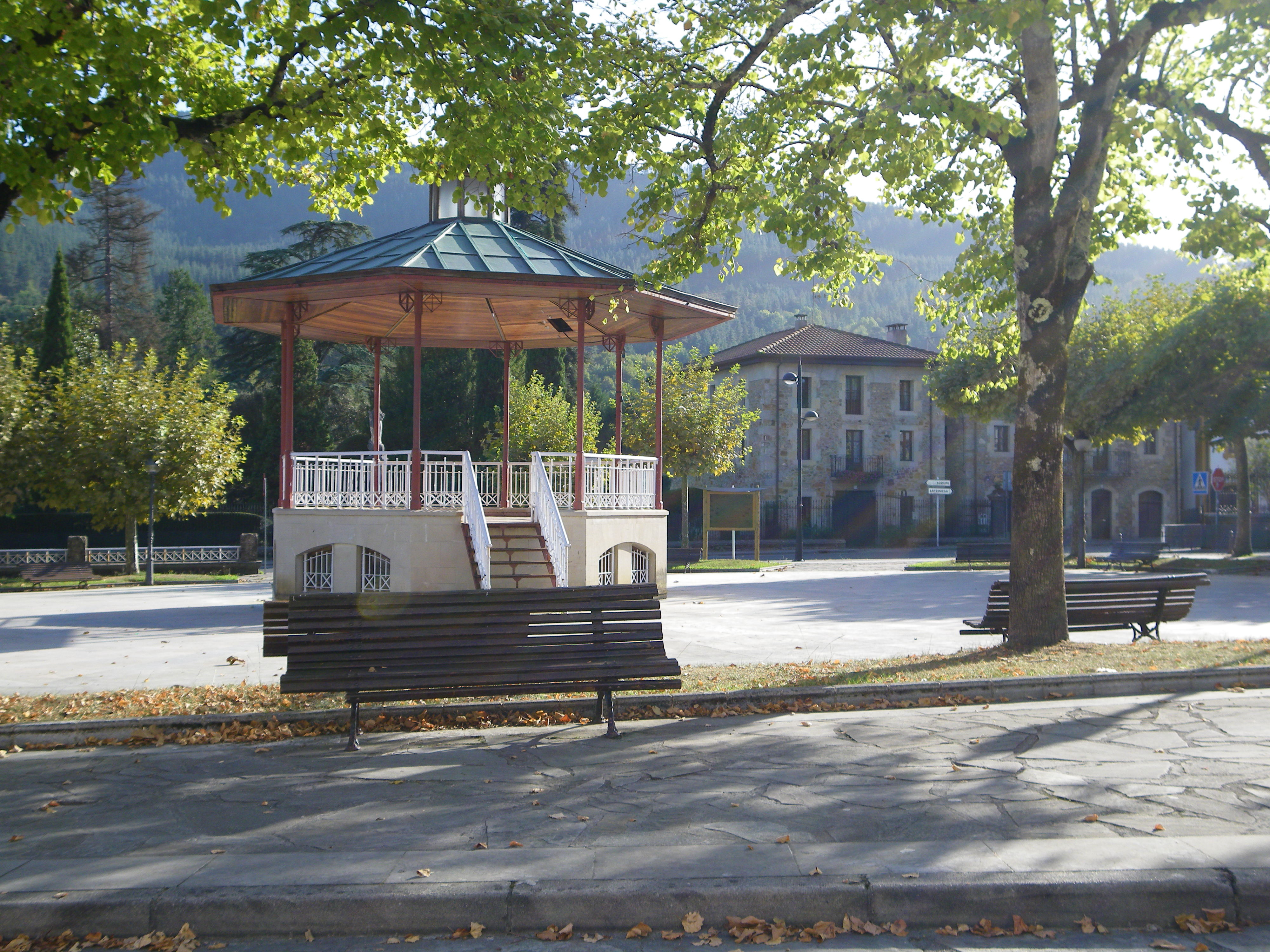 Gordoxolako Molinar enparantzako musika kioskoa.